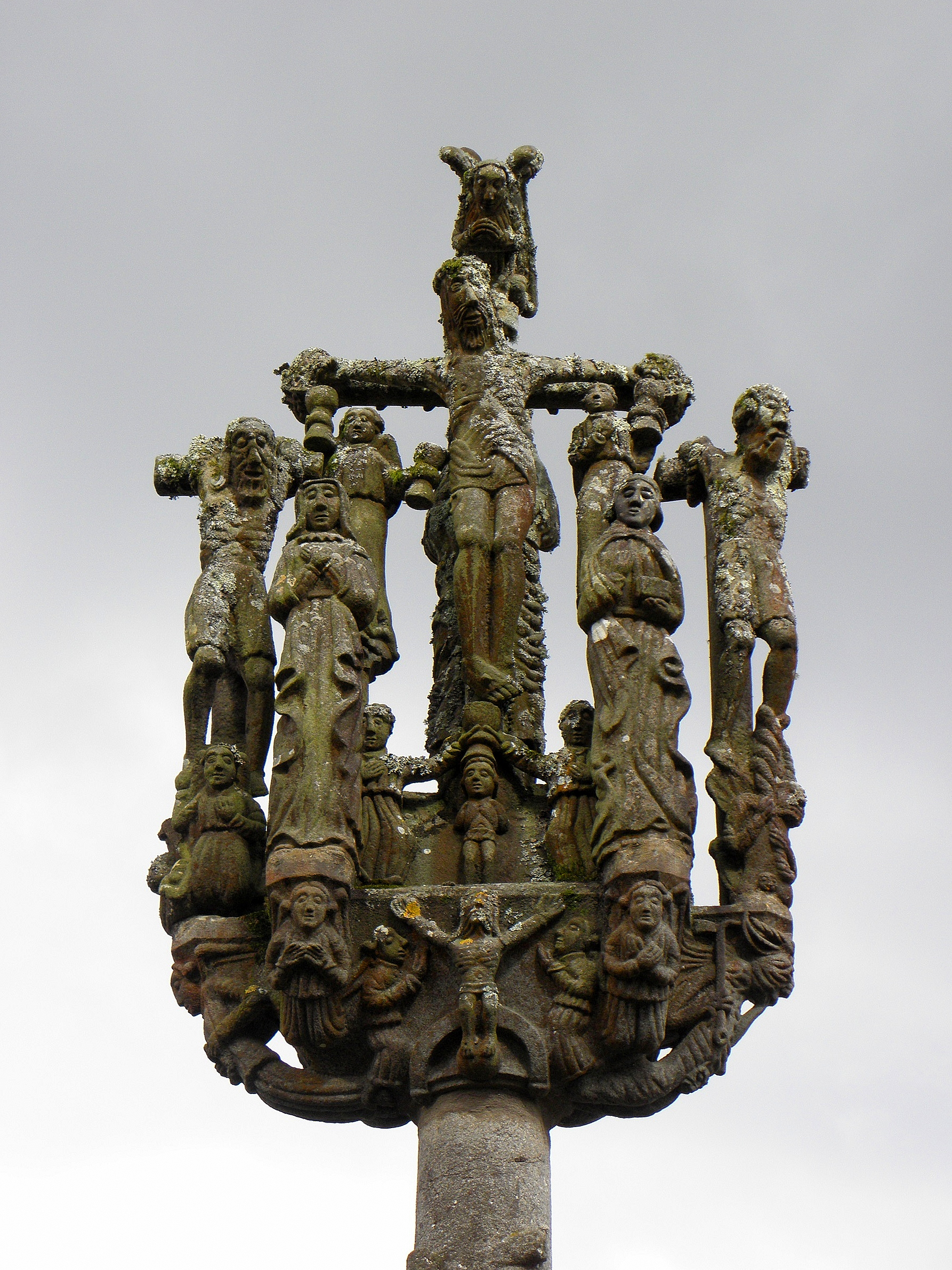 Calvaire de Saint-Herbot en Plonévez-du-Faou (29).